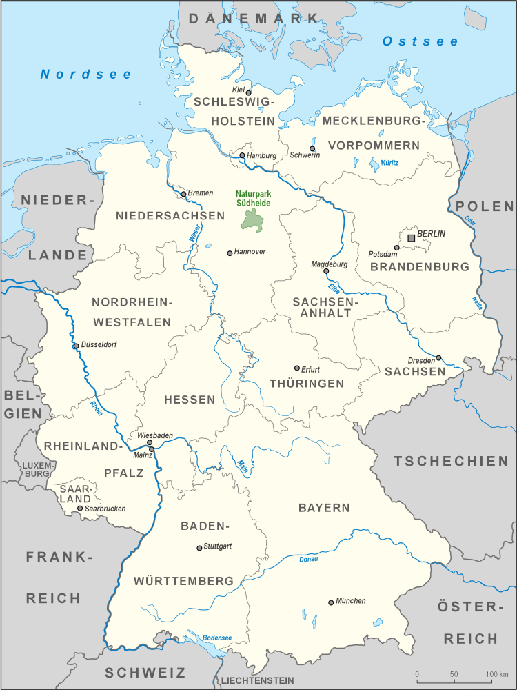 Karte des Naturparks Südheide in Deutschland